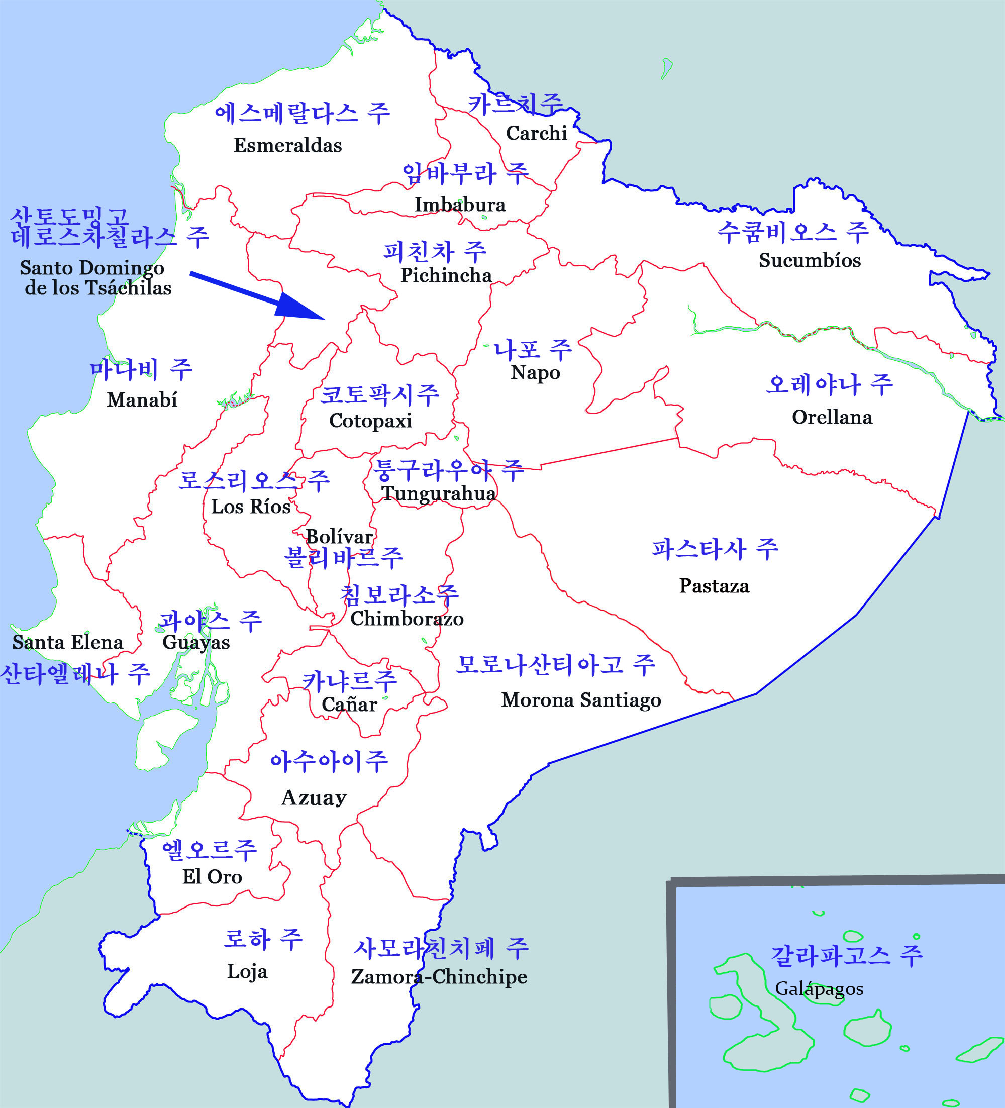 에콰도르 행정구역